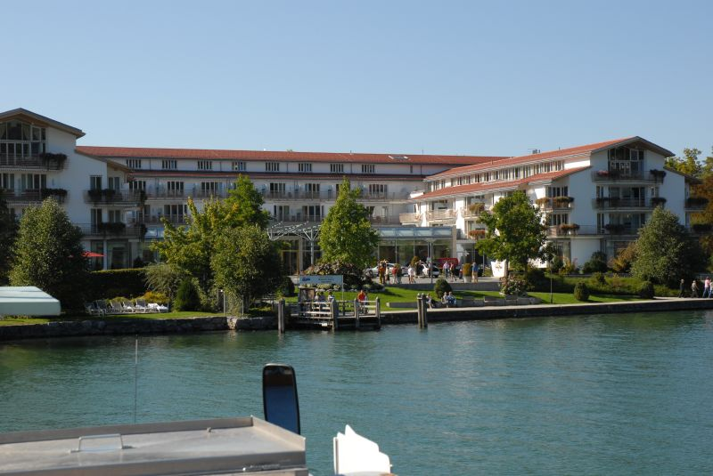 Fünf-Sterne-Hotel Sofitel Überfahrt in Rottach-Egern am Tegernsee, in Bayern in Deutschland.Fünf-Sterne-Hotel Sofitel Überfahrt in Rottach-Egern am Tegernsee, in Bayern in Deutschland. "Seeseite" des Hotels - Blick vom Tegernsee her.